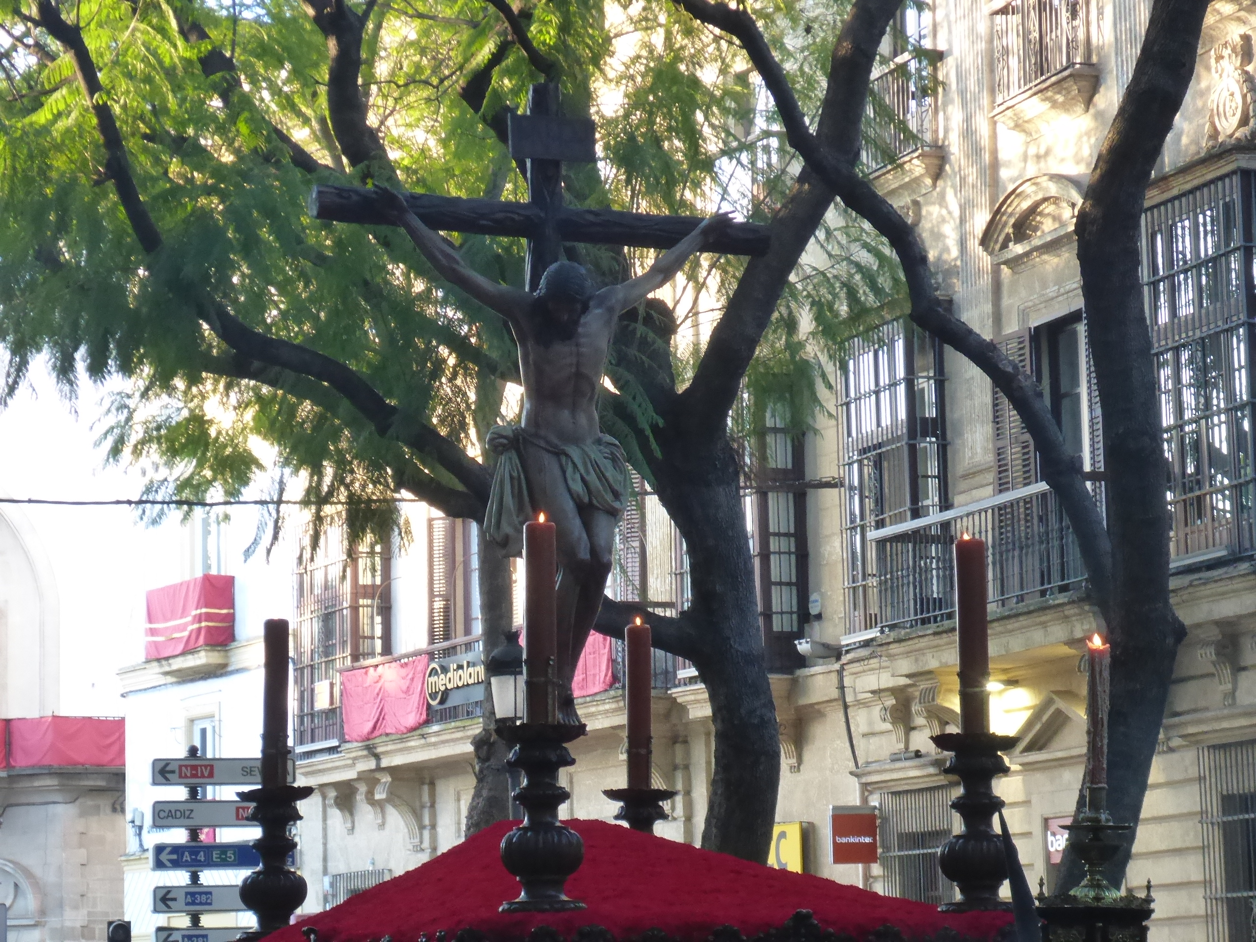 Hermandad de la Buena Muerte (Jerez)